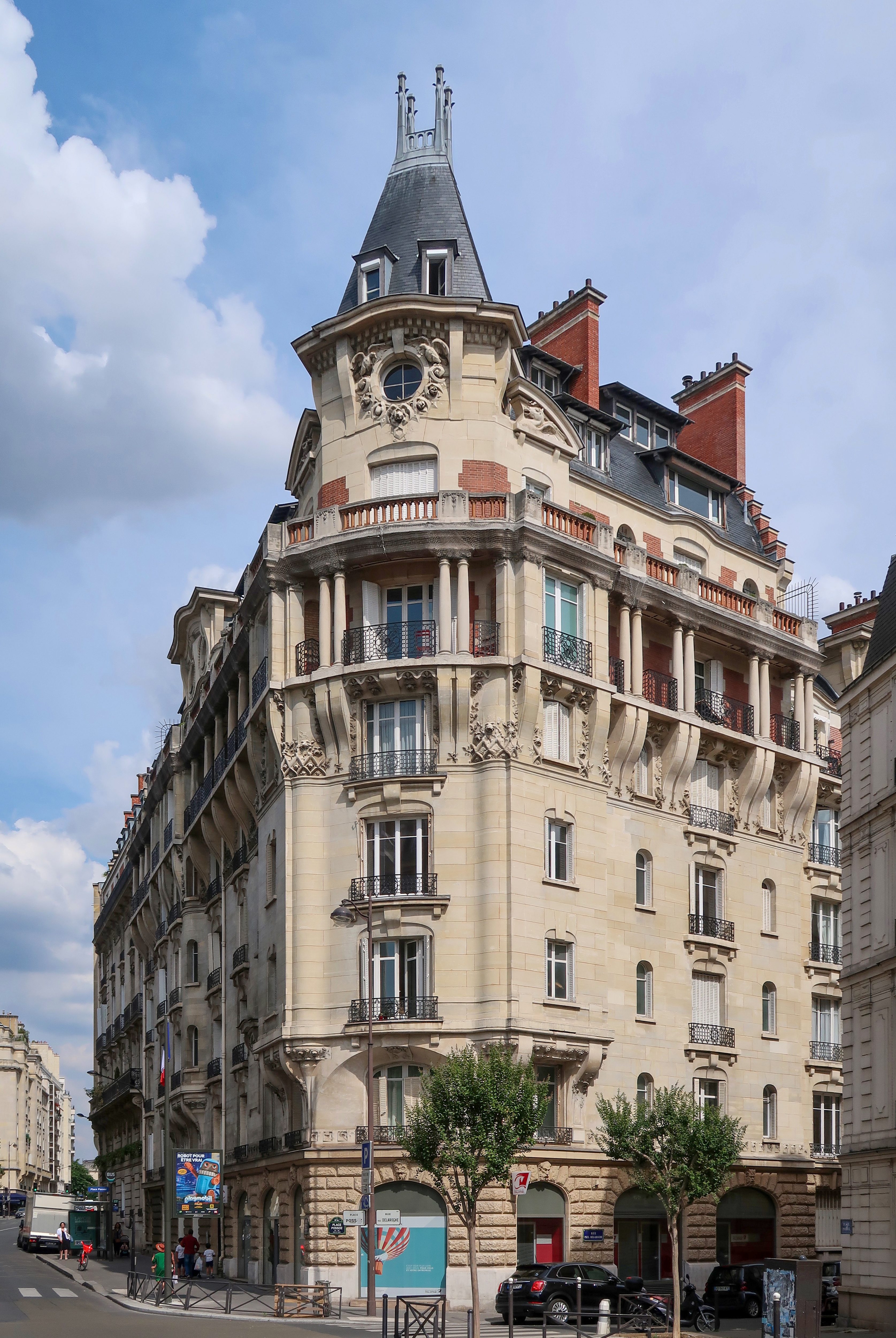 79 avenue Paul-Doumer et place Possoz (Paris, 16e).